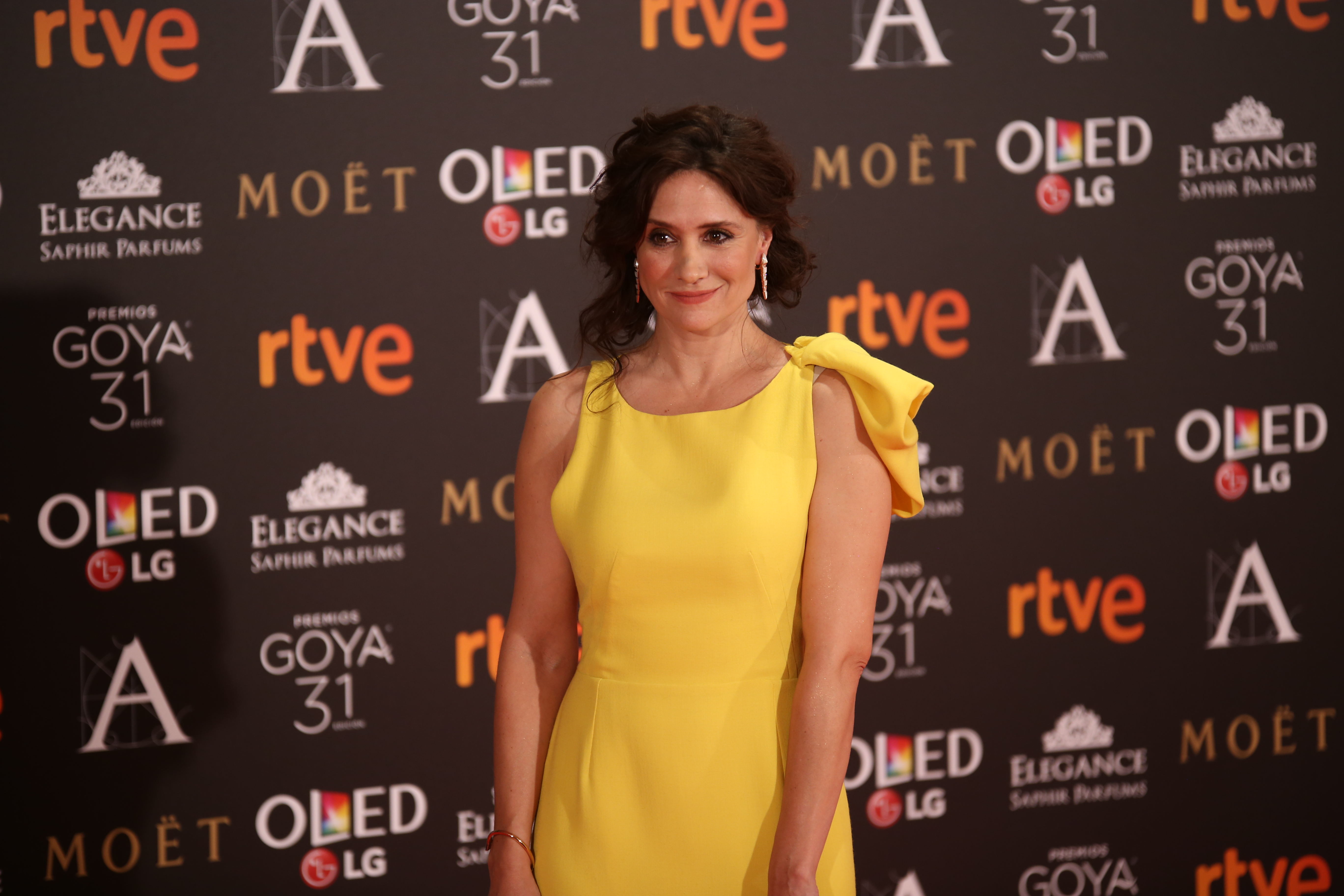 Premios Goya 2017